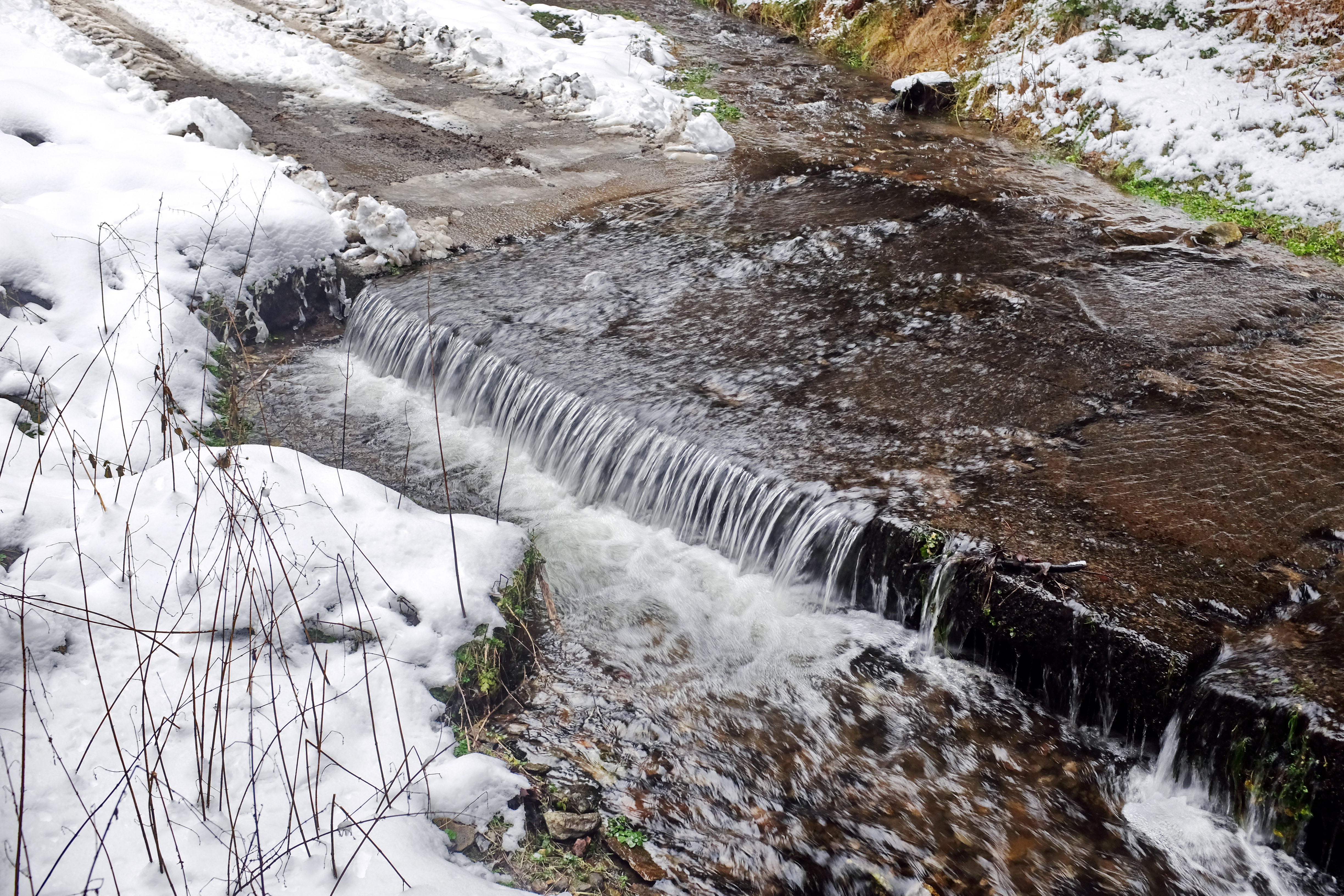 Novohorský potok, Krušné hory, okres Sokolov